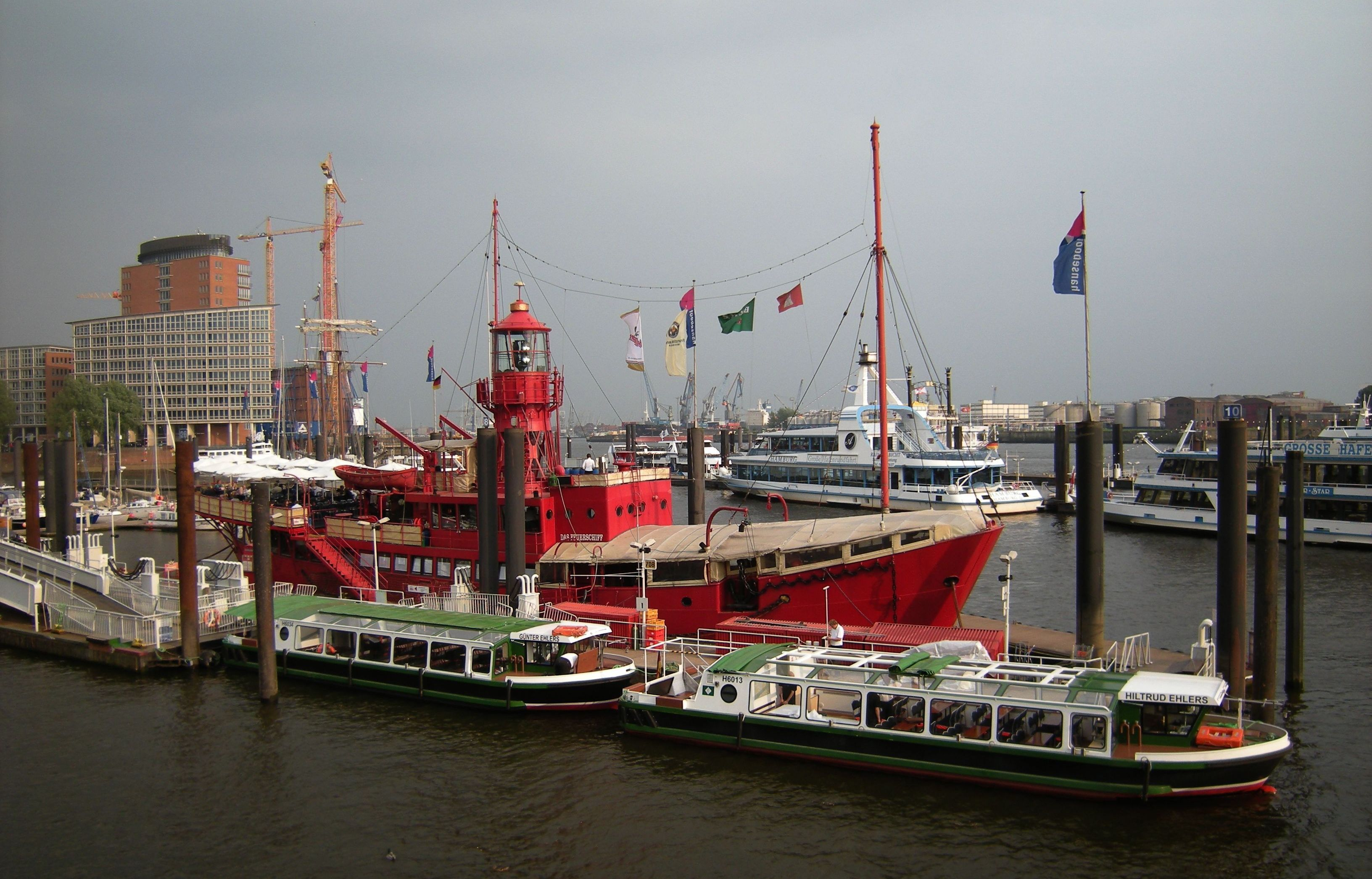 Hamburg- Museumsschiff an den Landungsbrücken.jpg